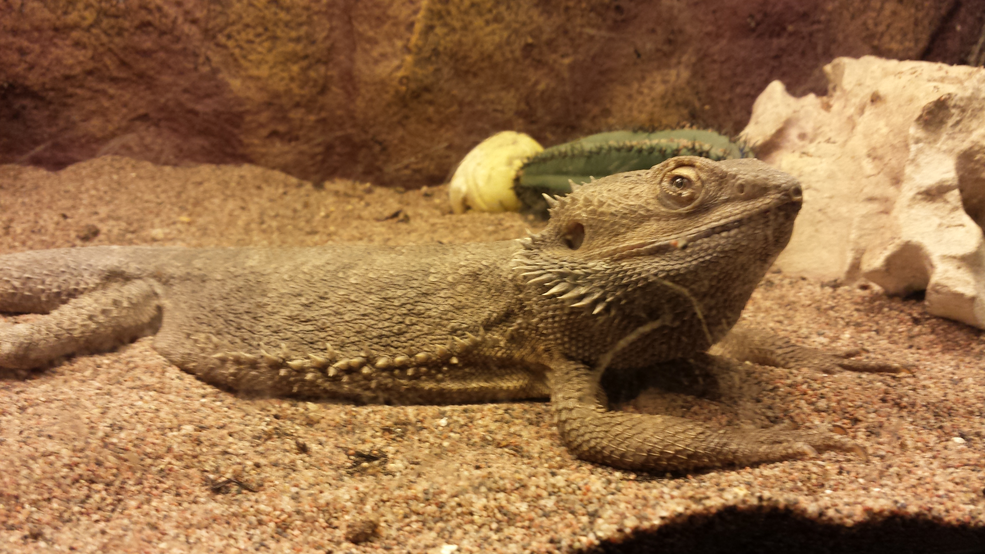 Skjeggagam